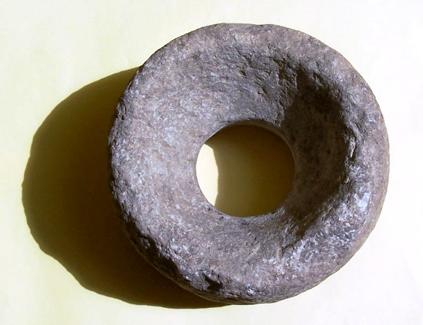 Piedra "negrito", utencilio domestico usado por los antiguos mixtecos para poner rajas de ocote sostenidas desde el centro y alumbrarse en la oscuridad. Basalto. 13 cms diametro x 8 cms alto.